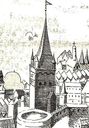 вежа галицької брами: фрагмент панорами Львова